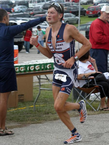 Maxim Kriat beim Ironman 70.3 Austin (2009)